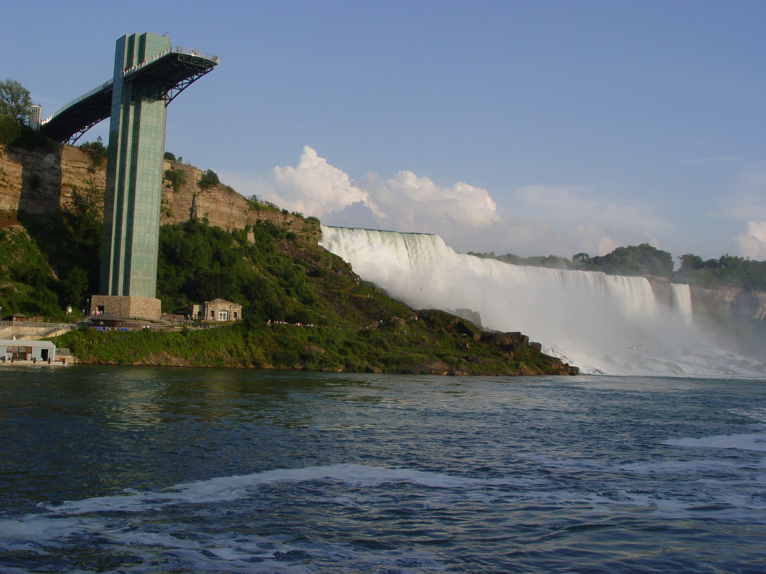 28美國尼加拉瀑布 Niagara Falls, USA